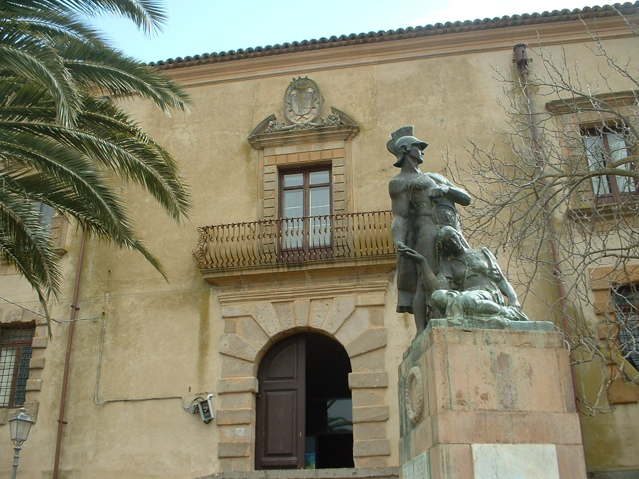 Mirabella Imbaccari (CT), Palazzo Biscari (1720), and Monumento ai Caduti (Monument to the Fallen) (1938) by Italian-American sculptor Pietro Montana.